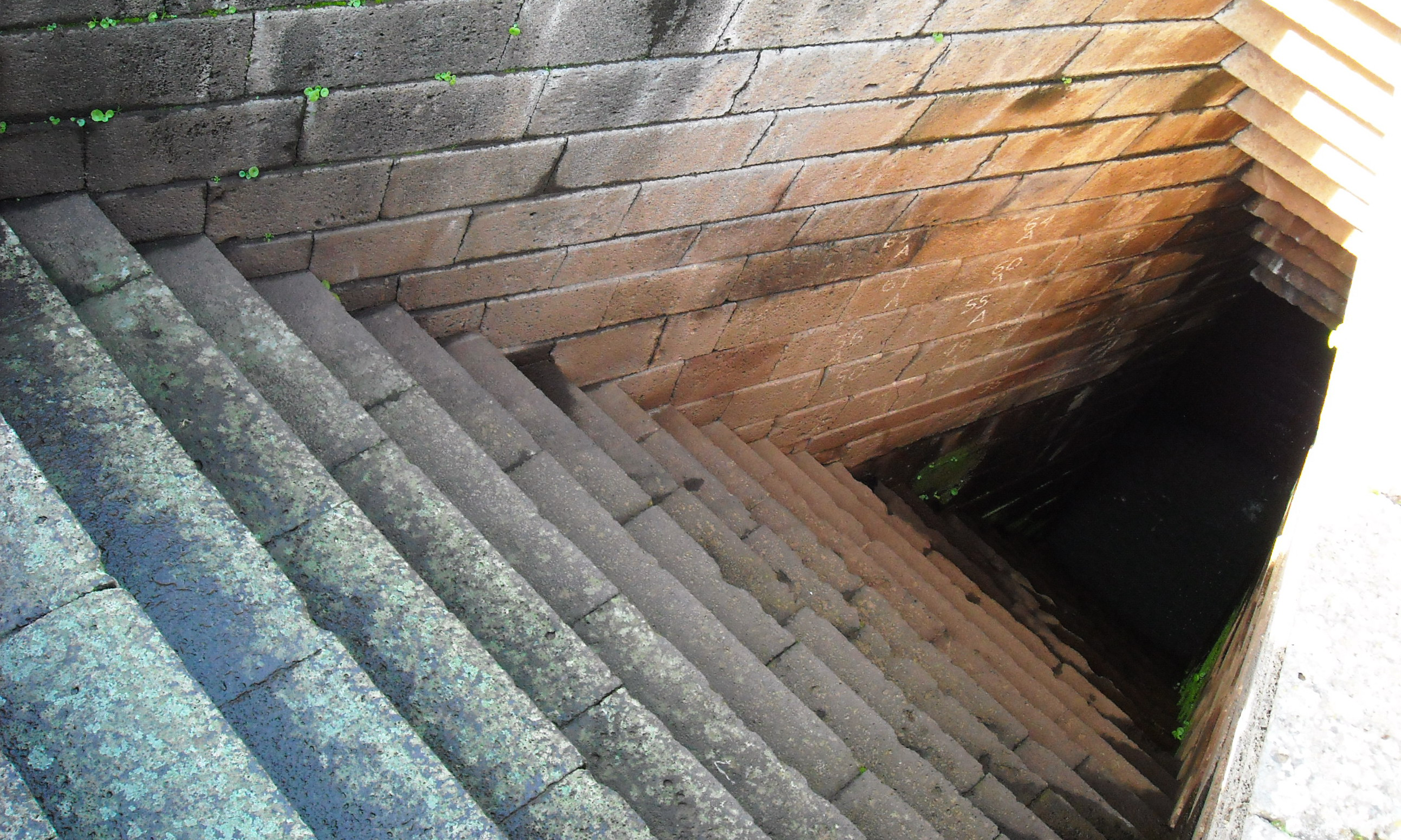 Santuario nuragico di Santa Cristina - MIBAC This is a photo of a monument which is part of cultural heritage of Italy.